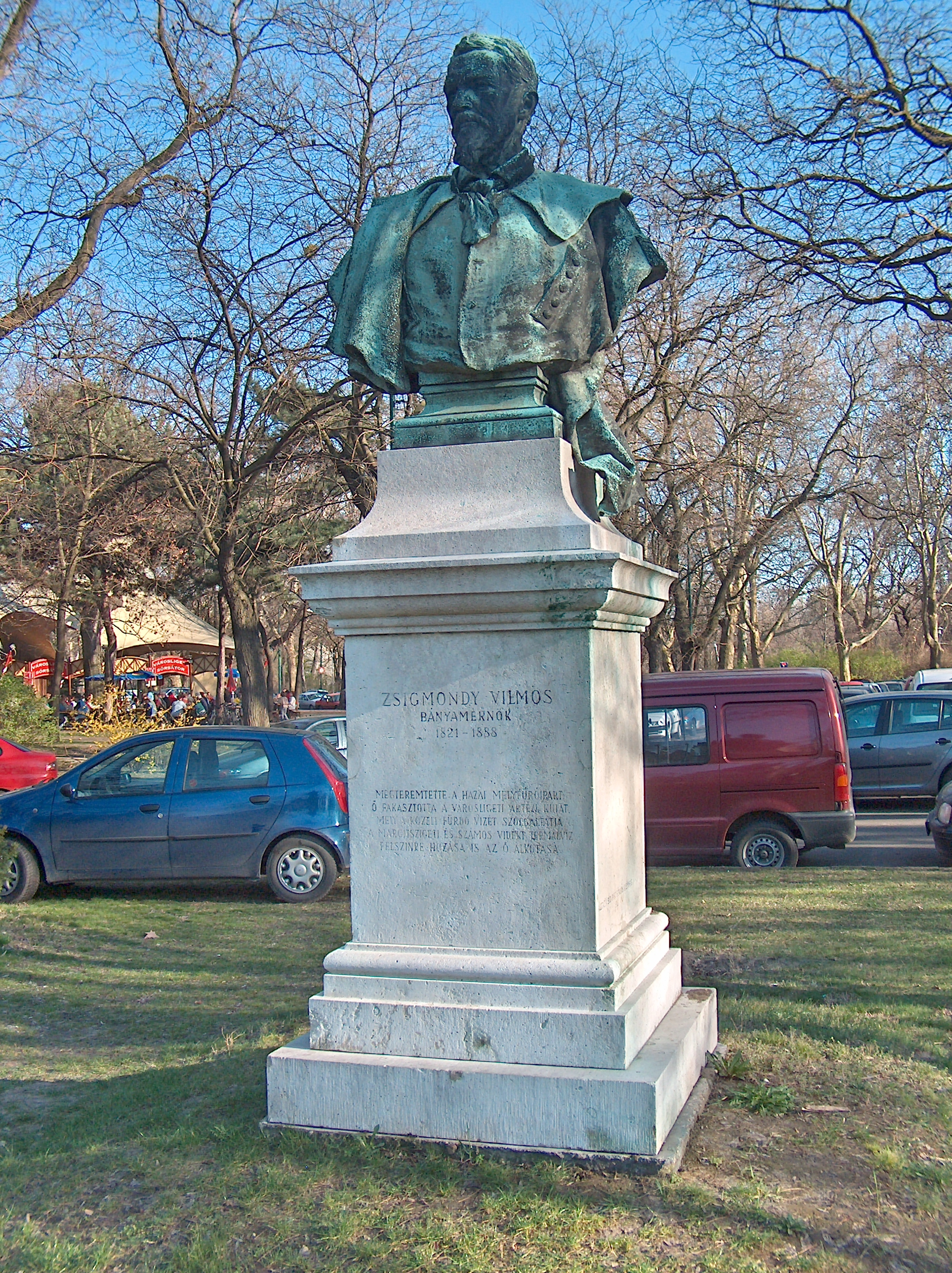 Zsigmondy mellszobra a Bp. Városligetben. Szécsi Antal (1856–1904) alkotása (1895)